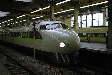 新幹線画像